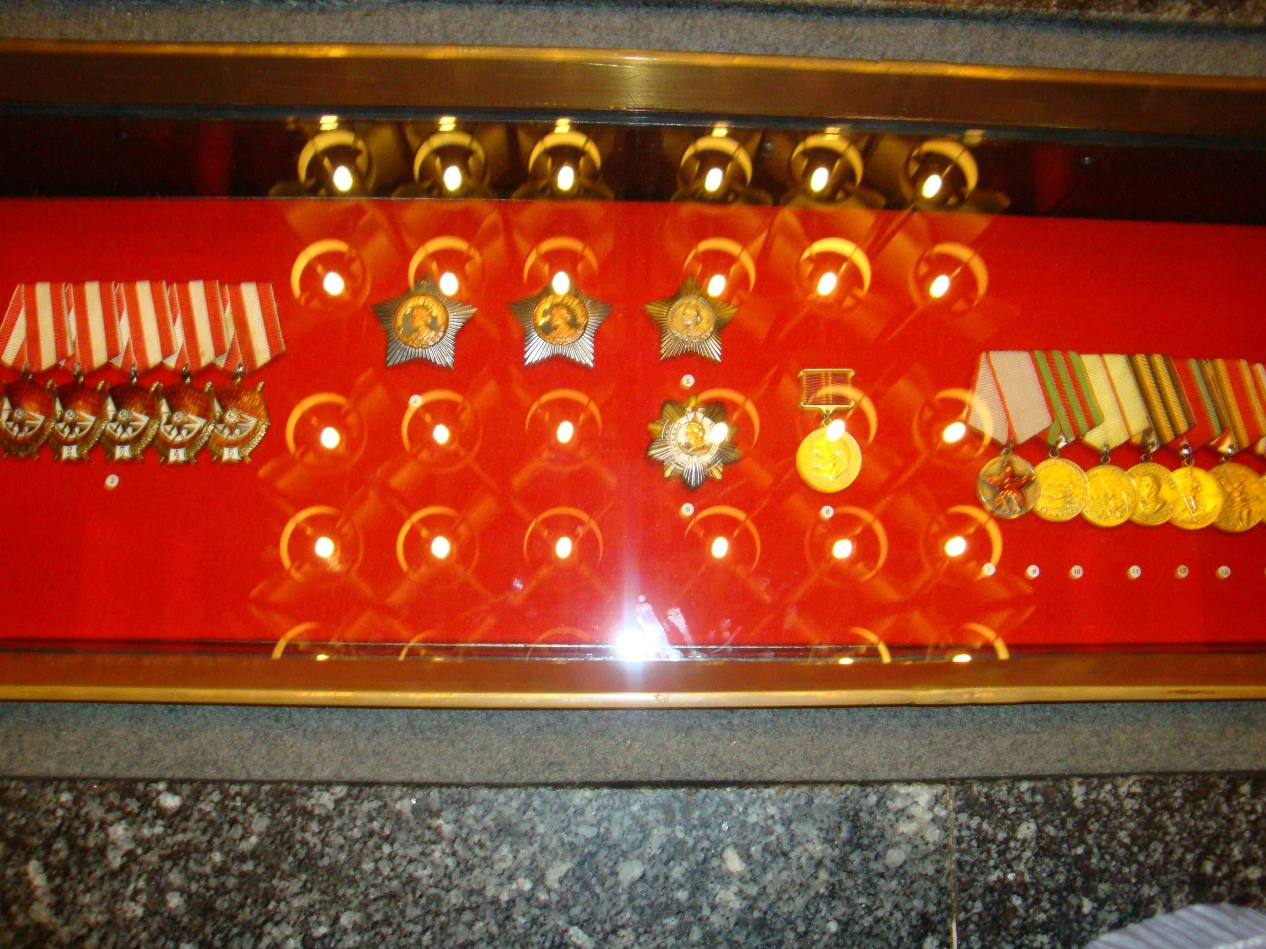 Награды Чистякова